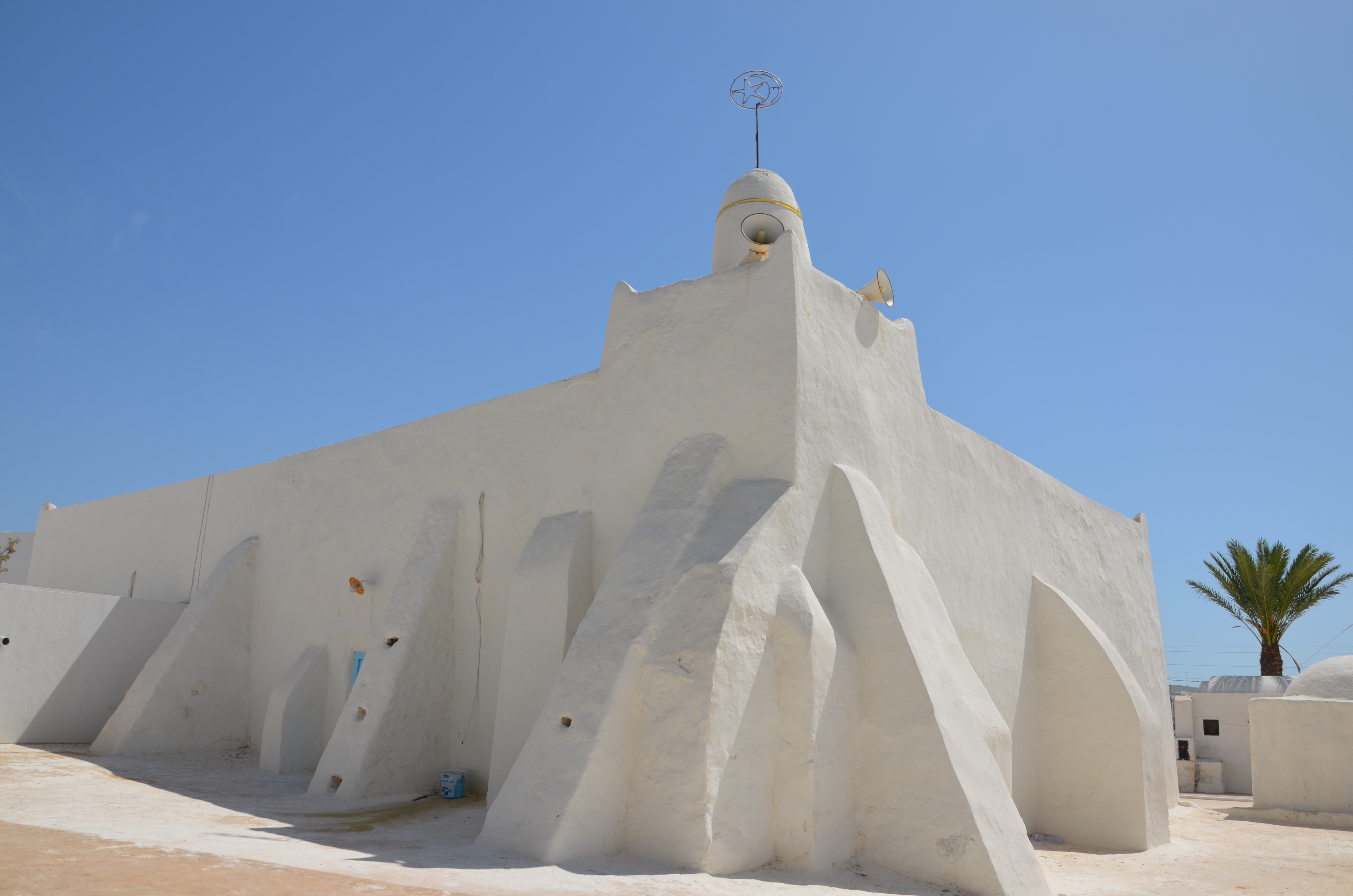 Djamaa el May (Ibadites) située sur la route d'El Kantara entre le souk el Kébir et Mahhoubine, El May